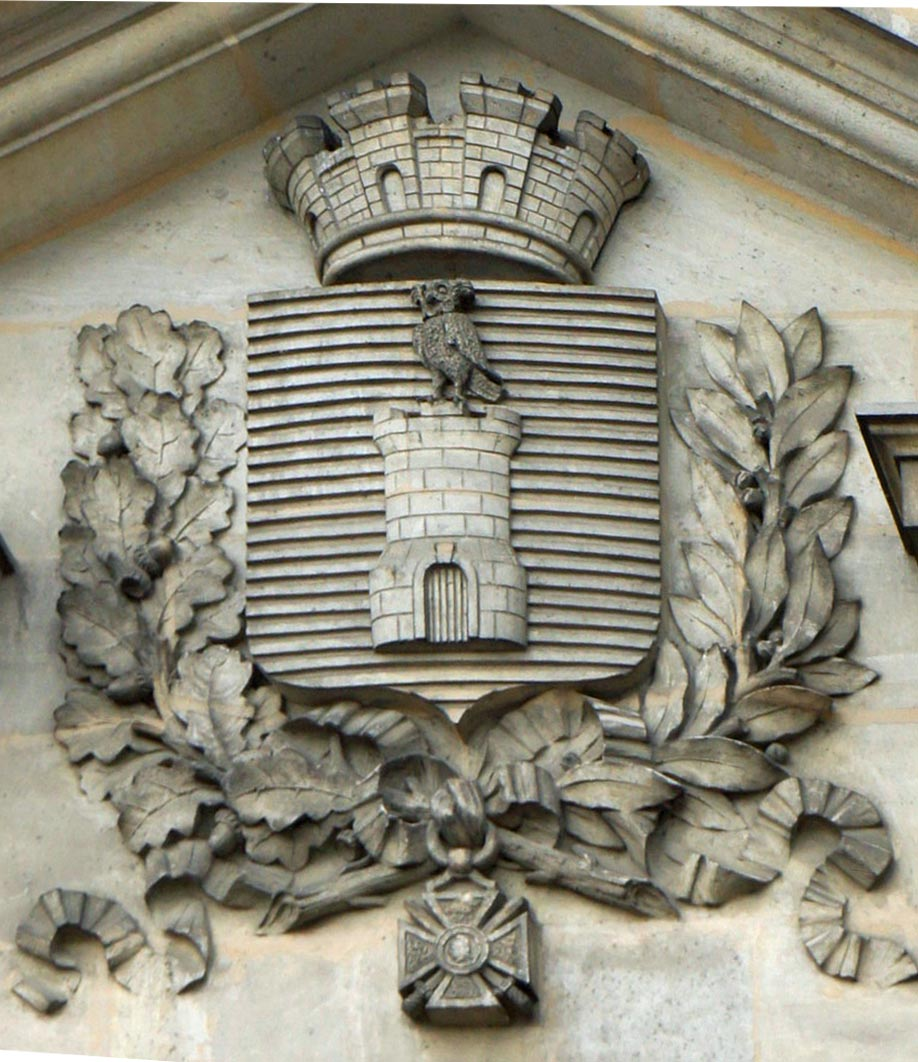 une vue du Blason de Cormicy sur la face de l'hôtel de ville.